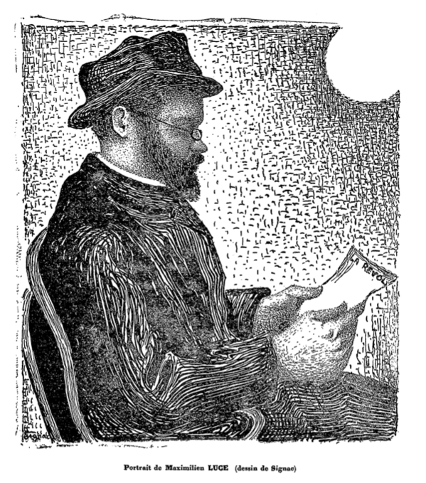 Portrait de Maximilien Luce